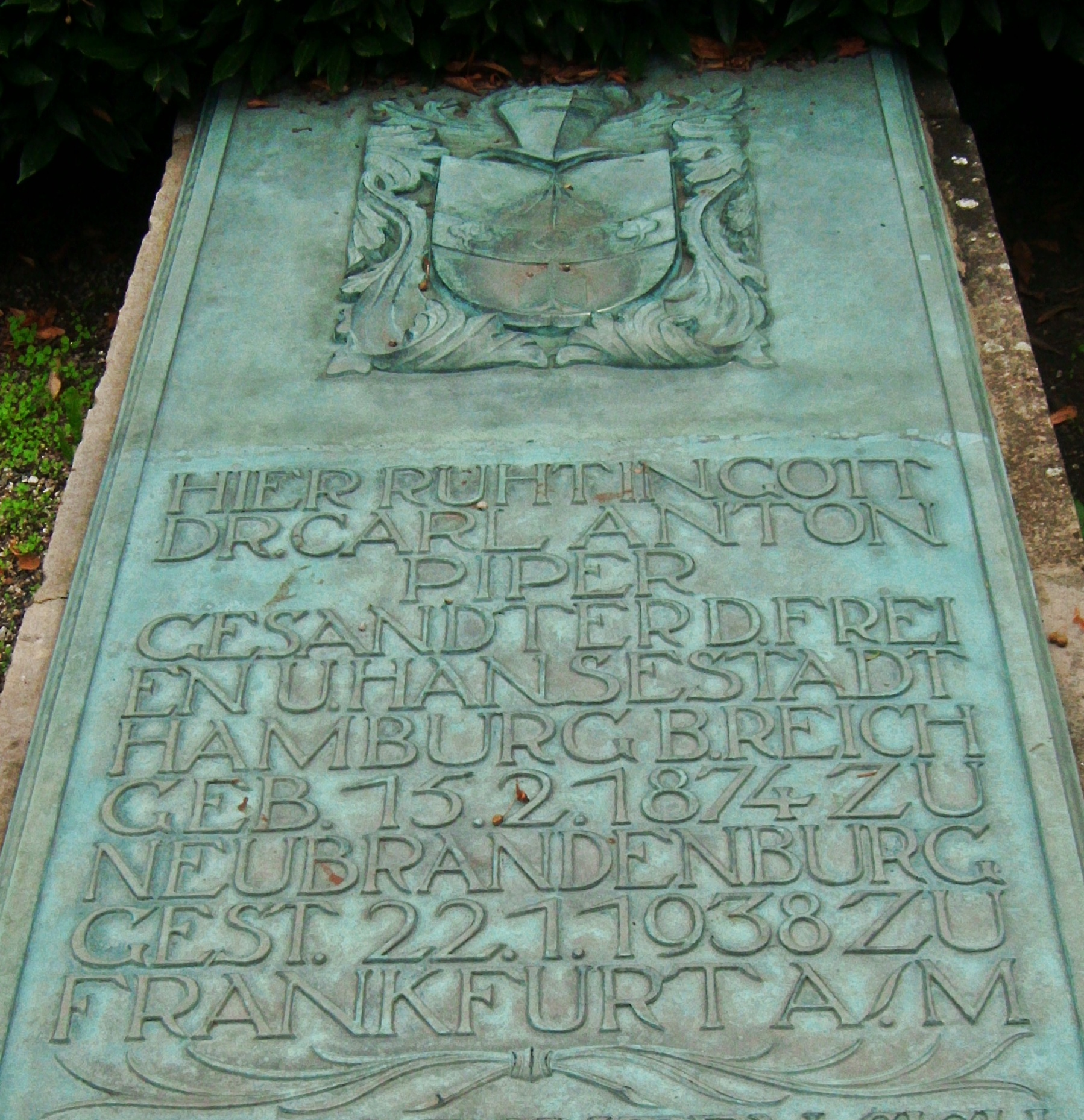 Carl Anton Piper (1874-1938), Reichstagsabgeordneter und Hamburgischer Gesandter, Grabplatte auf dem Friedhof Deidesheim, Rheinland-Pfalz